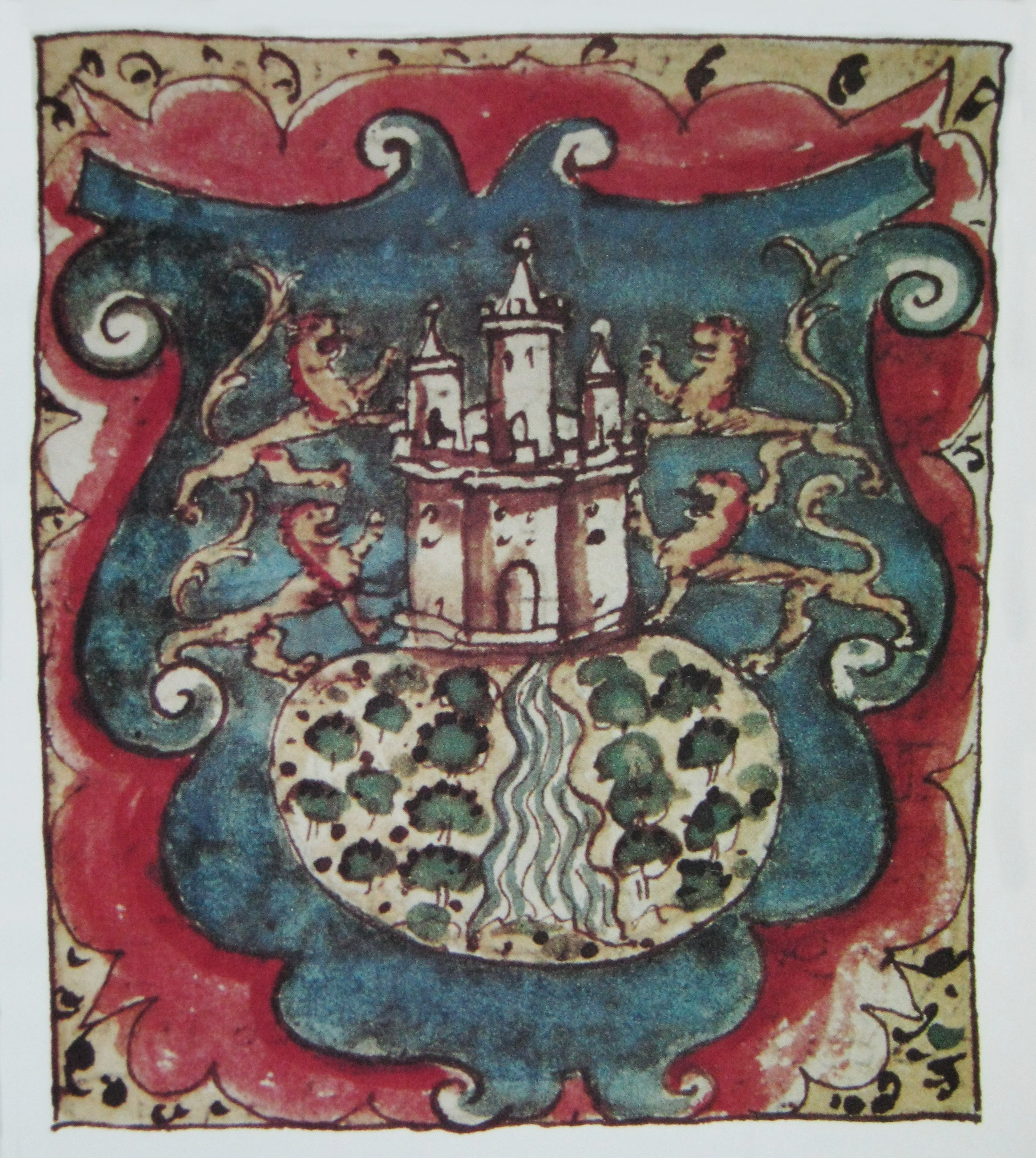 Dibujo del Escudo de Armas de San Juan de Pasto (Colombia) que vino integrado en la real cédula del 17 de junio de 1559 que concede las armas a dicha ciudad.